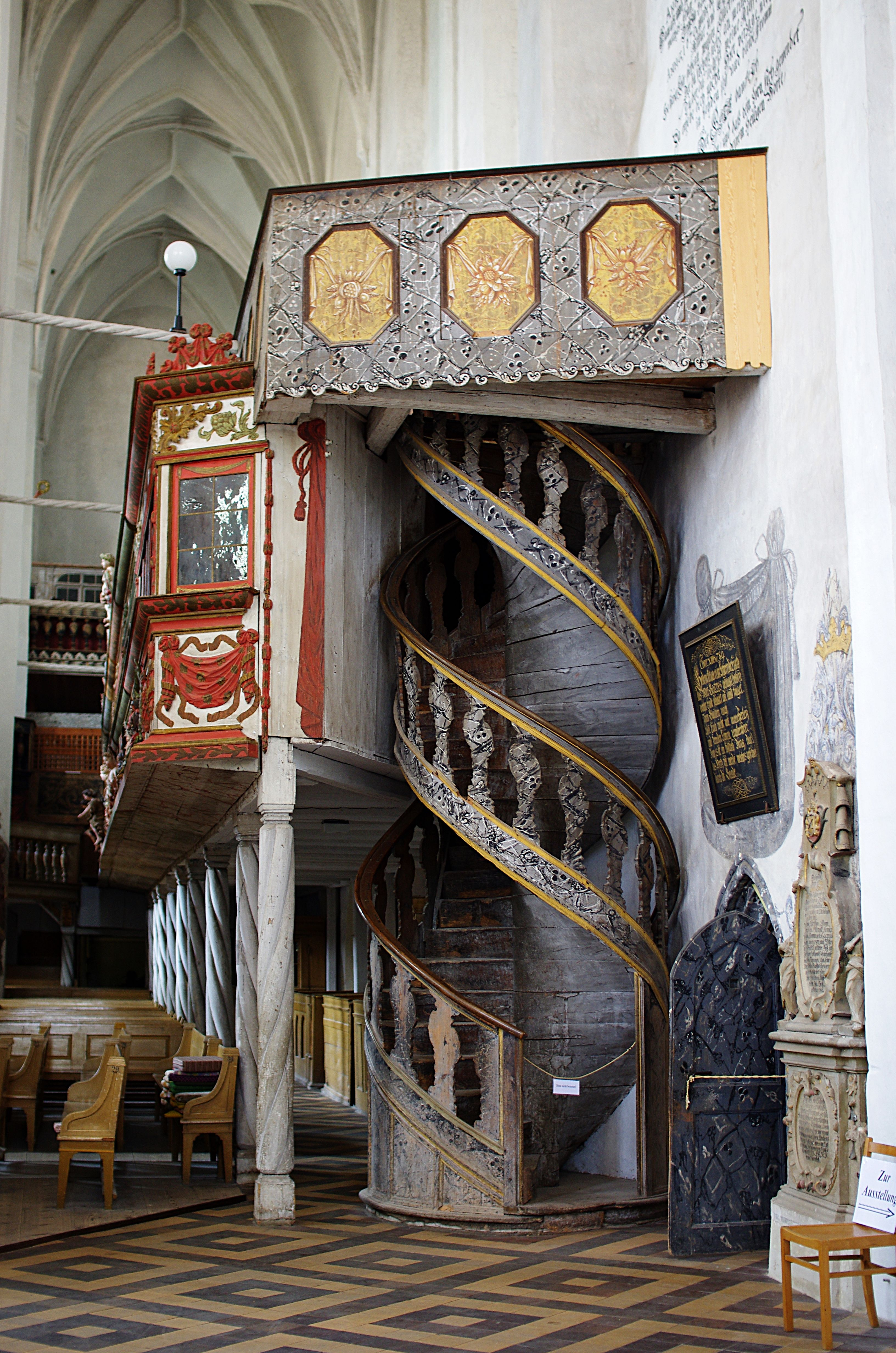 Luckau in Brandenburg. In der Kirch evon Luckenau befindet sich diese Doppeltreppe. Man kan auf der einen Seite hoch gehen ohne einen auf der anderen Seite heruntergehende Person zu treffen.